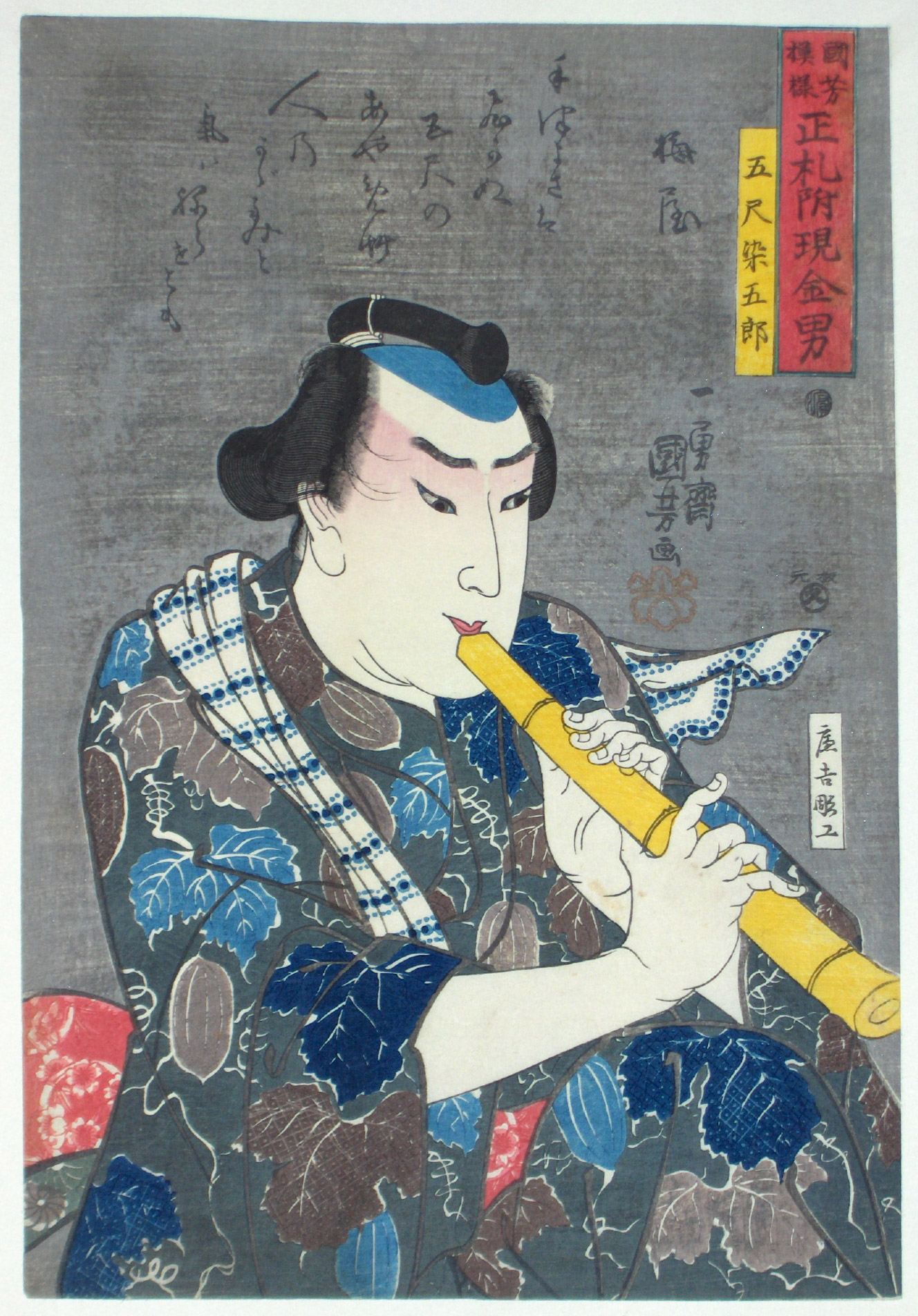 Shakuhachi_player.jpg